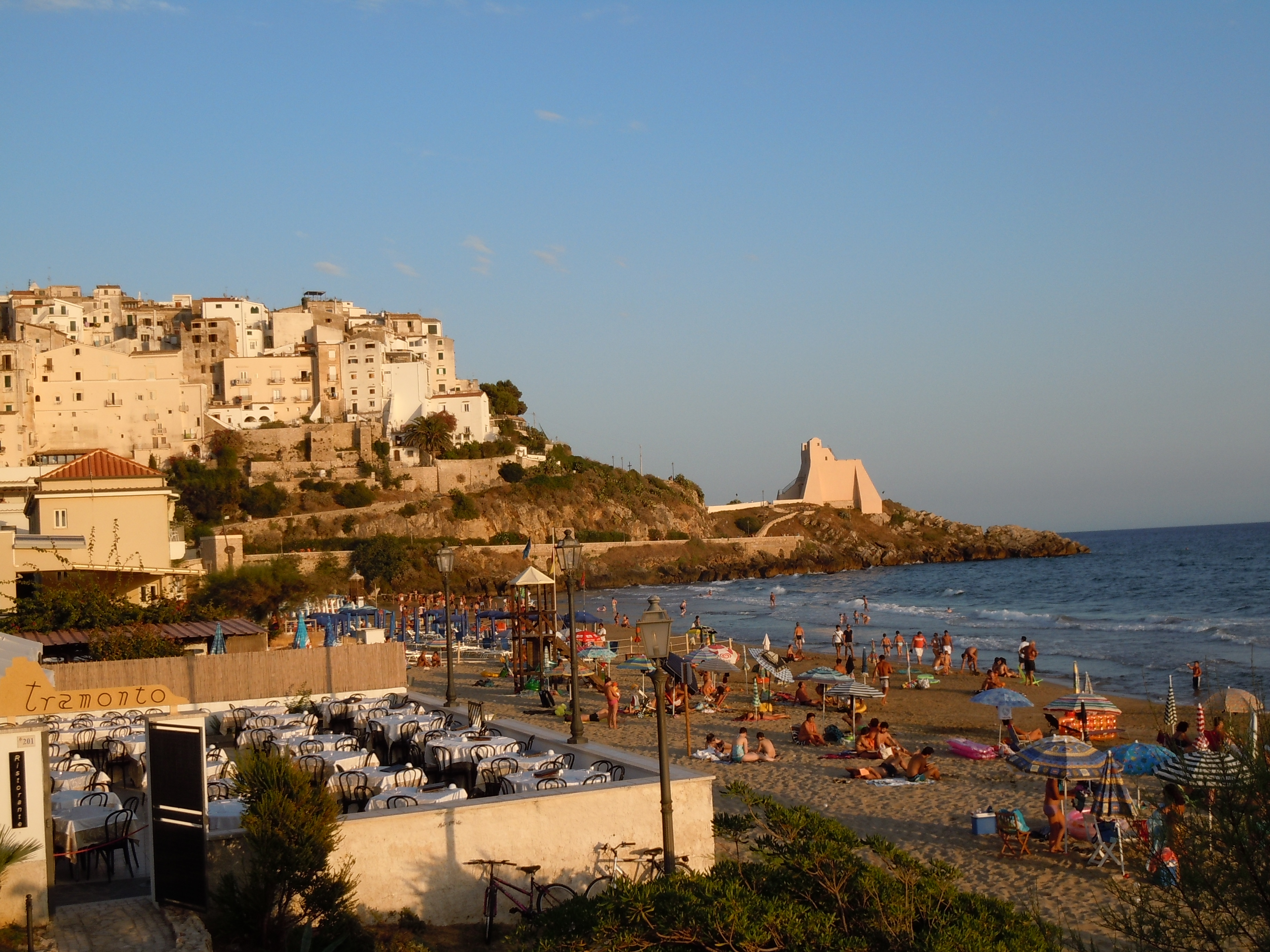 Spiaggia di Sperlonga